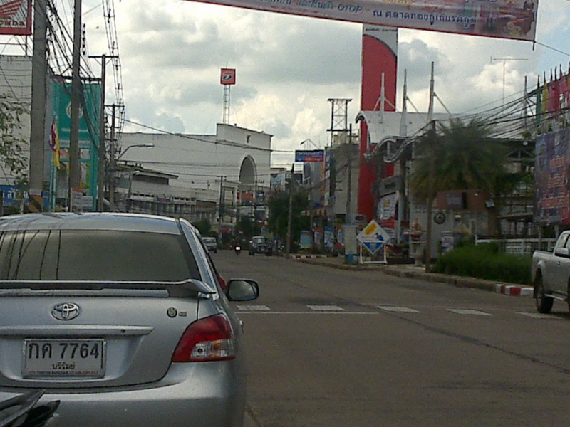 ย่านถนนปลัดเมือง เมืองบุรีรัมย์